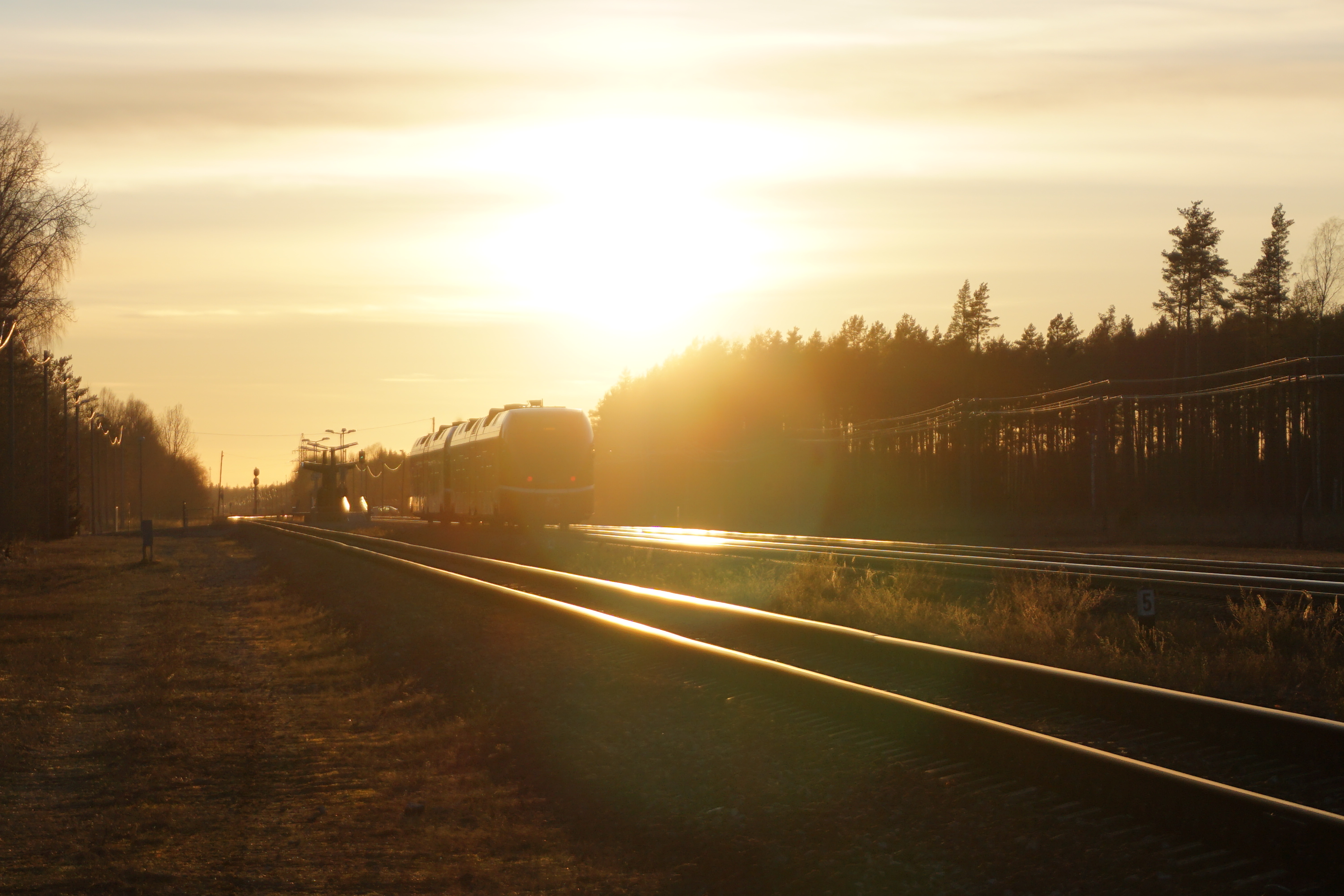 Elroni reisirong saabumas Orule.